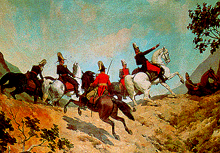 Detalle del Oleo sobre tela de la Batalla de Carabobo, mural ubicado en el Capitolio Nacional de Venezuela. En el se puede apreciar a Simón Bolívar dirigiendo la batalla junto a su estado mayor.